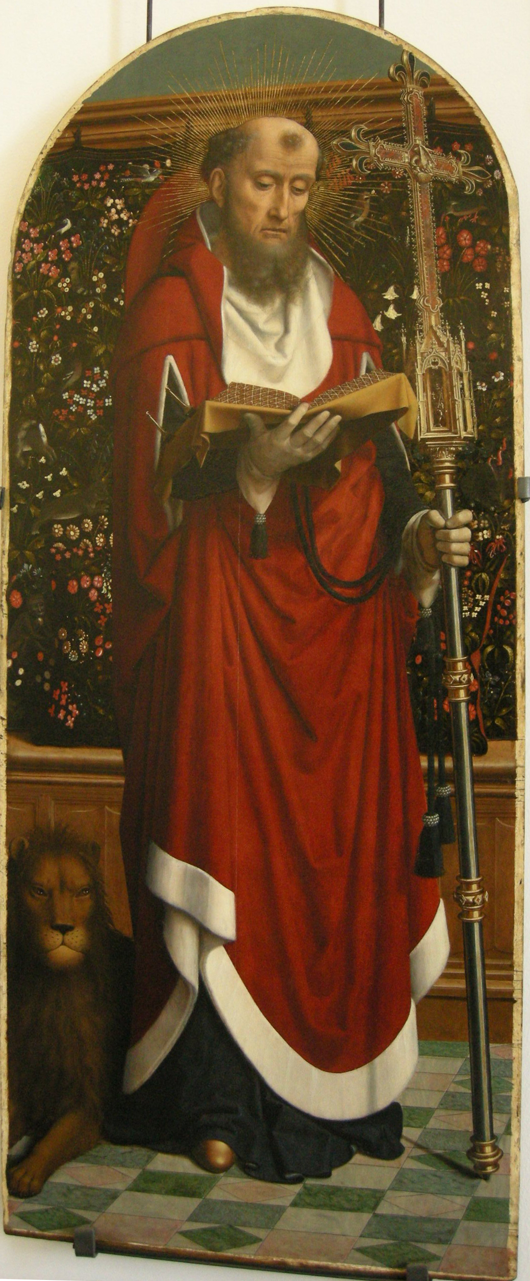 Gerard david, polittico della cervara